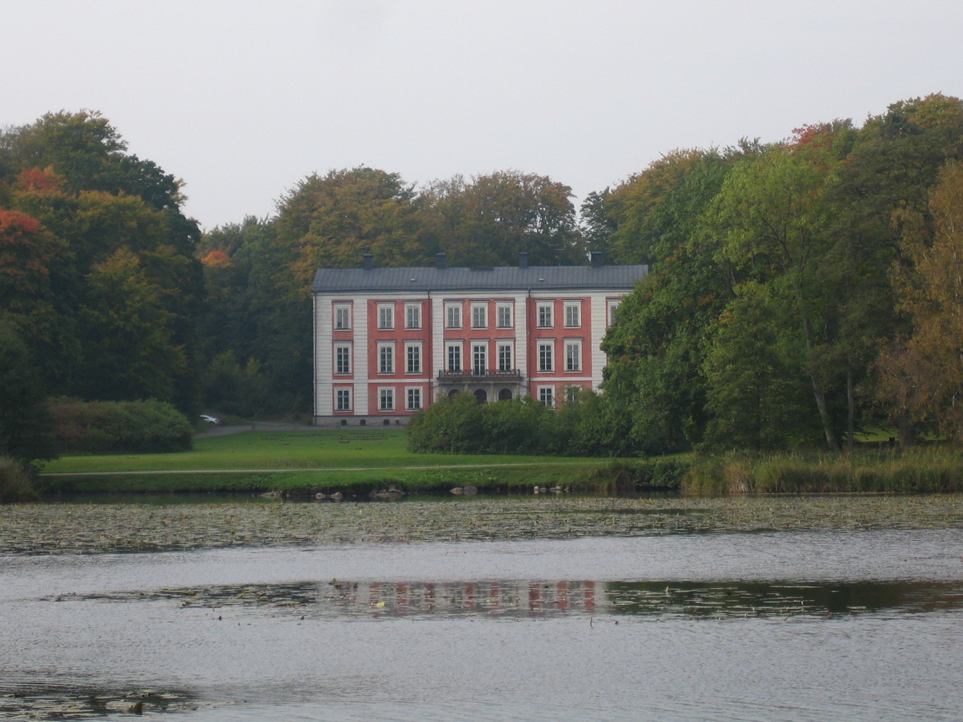 Ovesholms slott. Bilden tagen av mig själv 9 oktober 2005.